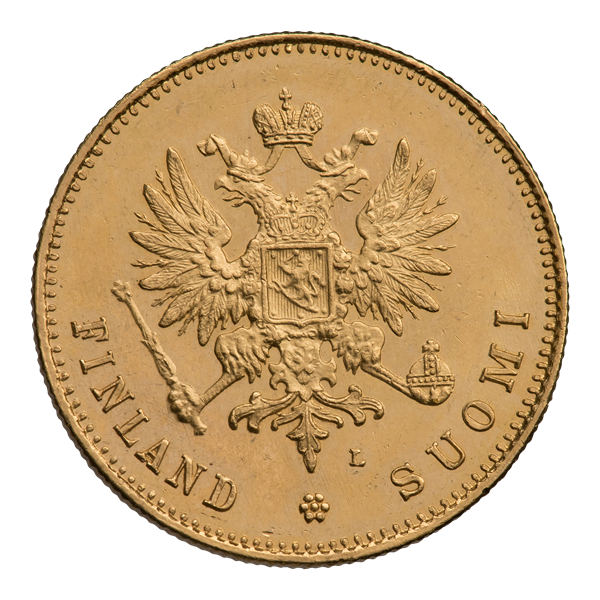 Двадцать марок 1891 г. (аверс). Биткин 227 (R). Двуглавый орёл с распростёртыми крыльями под тремя коронами; из верхней короны спускается развевающаяся Андреевская лента; на груди орла щит с гербом Великого Княжества Финляндского, окружённый цепью ордена св. Андрея Первозванного. В лапах орла скипетр и держава. Под орлом знак директора монетного двора: L (Johan Conrad Lihr). Внизу надпись полукругом: FINLAND * SUOMI